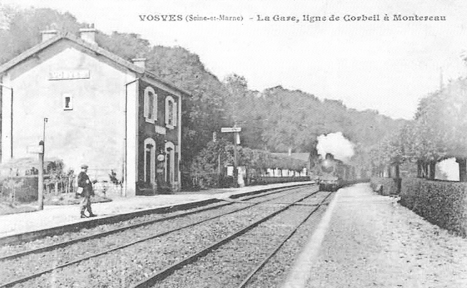 La gare de Vosves (Seine-et-Marne, France), au début du XX° siècle.